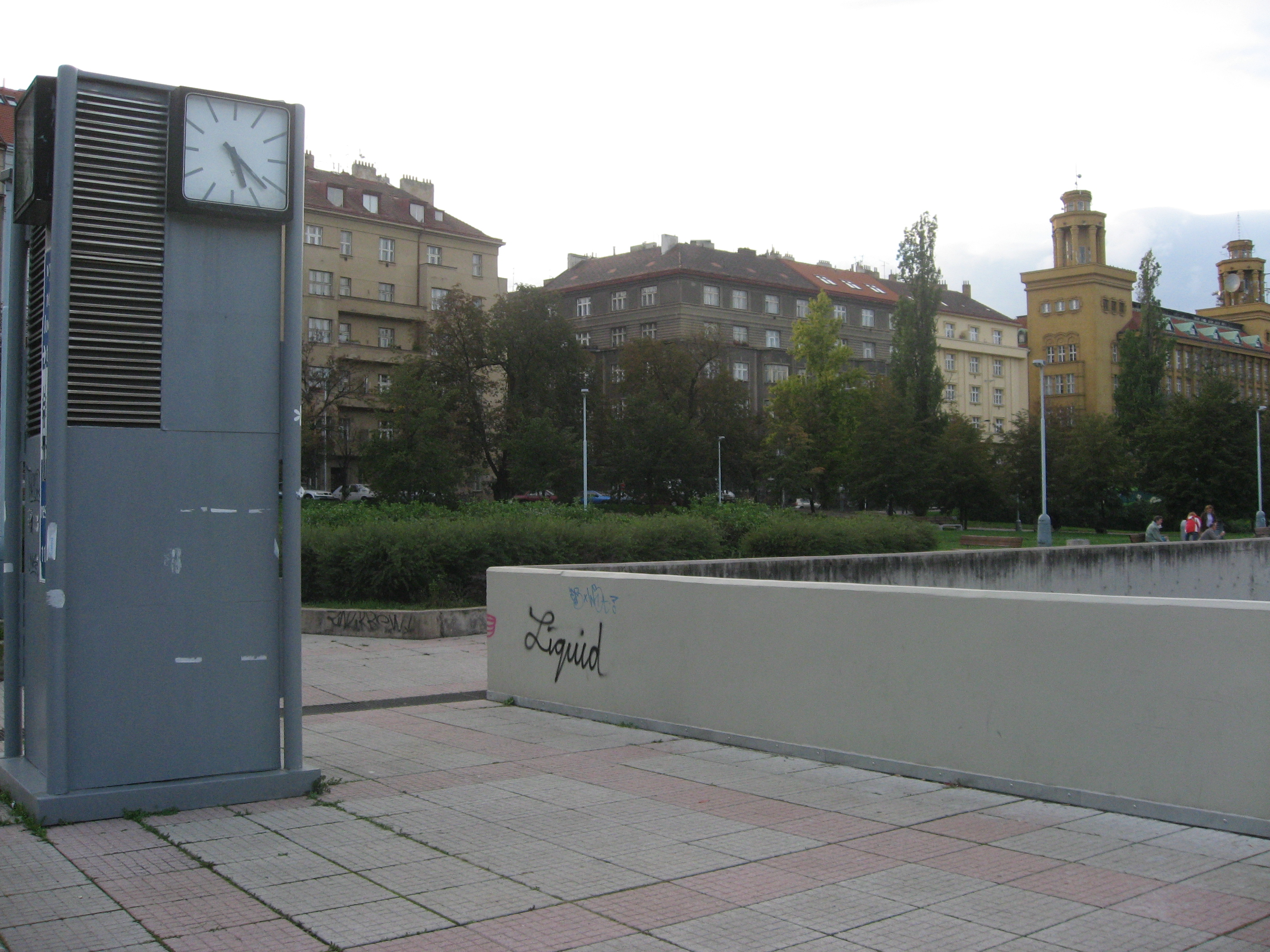 Mahlerovy sady